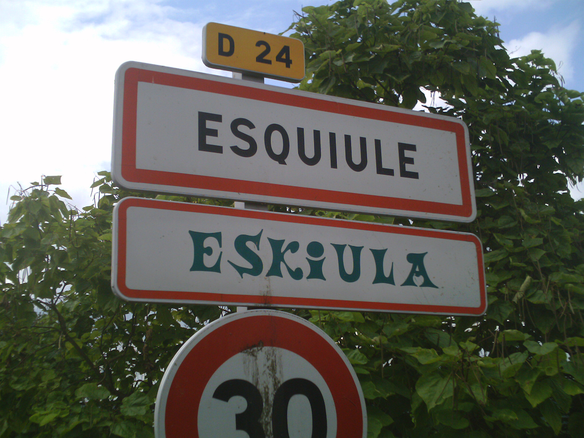 Eskiulako elebidun seinalea